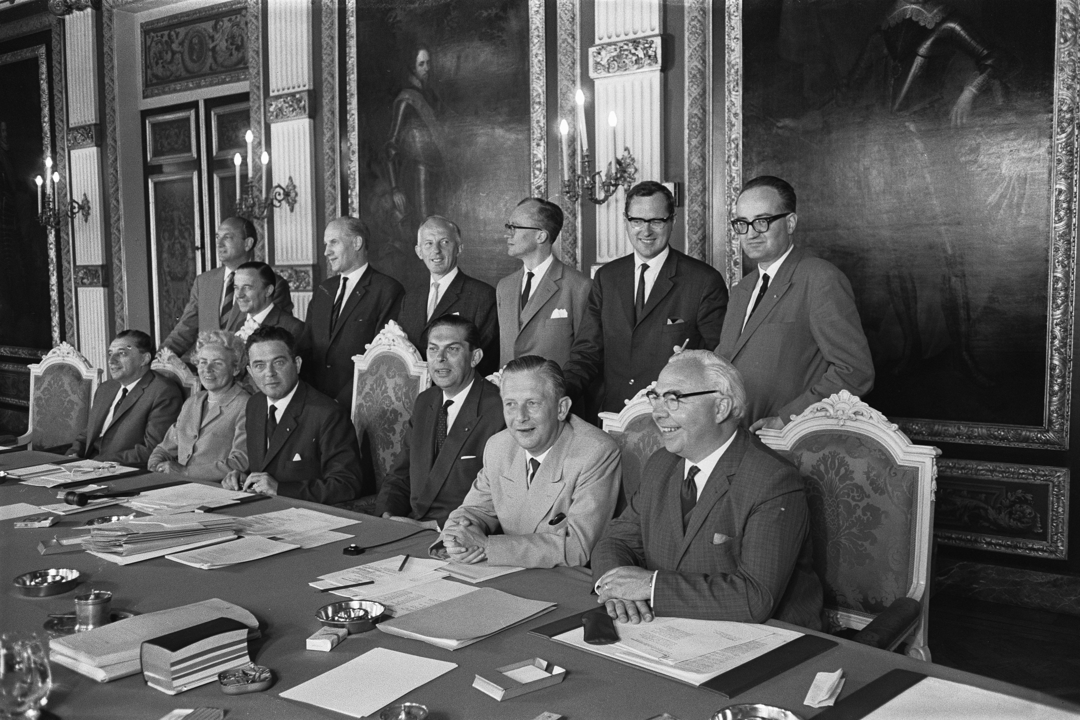 Collectie / Archief : Fotocollectie Anefo Reportage / Serie : [ onbekend ] Beschrijving : Het kabinet van Marijnen in vergadering bijeen. Van Aartsen , Schouwenaar, Franssen, Marijnen, Biesheuvel, Scholten, Veldkamp, Toxopeus, De Jong, Bot, Datum : 23 juli 1963 Trefwoorden : Vergaderingen, kabinetten Persoonsnaam : Biesheuvel, Barend, Marijnen, Victor Fotograaf : Pot, Harry / Anefo Auteursrechthebbende : Nationaal Archief Materiaalsoort : Negatief (zwart/wit) Nummer archiefinventaris : bekijk toegang 2.24.01.05 Bestanddeelnummer : 915-3746